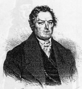 Abbild eines historischen Stiches